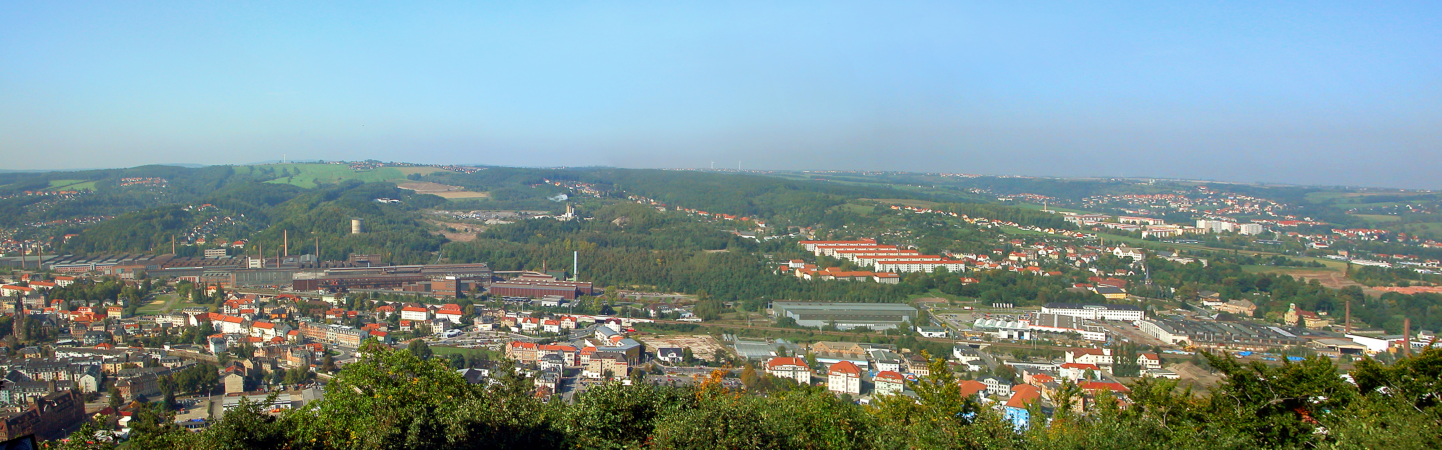 26.09.2008 01705 Freital: Sicht vom Windberg (GMP: 50.997728,13.659658): Der ganze linke Vordergrund ist Freital-Deuben mit der Christuskirche (GMP: 50.994784,13.647411) ganz am linken Bildrand. Diagonal durch den Mittelgrund verlaufen die Werksanlagen des Edelstahlwerkes Freital (GMP: GMP 50.9970,13.6418). Im Hintergrund am linken Bildrand sind die Freital-Hanisberger Siedlungen am Ziegenberg/ Döhlener Wald zu sehen - "Sonnenhöhe/Windbergblick", Rehsteig/ Heimatblick", "Eichbergweg" und "Am Paffengrund". Mittig am Hang hinter dem Edelstahlwerk der auffällige Kühlturm (GMP: 50.998011,13.638109). Dahinter am Horizont der Stadtteil Freital-Weißig mit dem einzelnen Windrad (GMP: 50.995526,13.602586) links vom Ort auf der Opitzhöhe. Von Weißig verläuft nach rechts die Weißiger Straße durch die Ortsteile Oberdöhlen und Döhlen ins Tal. Rechts von Freital-Weißig am Horizont folgt Freital-Saalhausen, dann die Höhenzüge bei Kesselsdorf. Im Vordergrund in Bildmitte rechts liegt Deuben. Das dahinter liegende, auffällige Altneubau- Wohngebiet mit der strengen Zeilenbebauung ist in Freital-Döhlen. Am Horizont Oberhermsdorf, Kesseldorf, Freital-Wurgwitz. Im Vordergrund rechts die "Windberg-Arena" (GMP: 51.005465,13.650230), eine umgenutzte DDR-Industriehalle des einstigen Plastmaschinenwerkes . Gleich rechts dahinter das ehemalige Rathaus Döhlen (GMP: 51.007008,13.650152) mit der grünen Kupferkuppel an der Lutherstraße 22. 200 m links davon die Lutherkirche (GMP: 51.006797,13.647779). Hinter ihrer Turmspitze die Deubener Schule aus der Gründerzeit, hinter dieser wiederum das DDR-Neubaugebiet Freital-Zauckerode. Dahinter zieht sich Freital-Wurgwitz den Hang zum Horizont hinauf. [DSCN34170-34171.TIF]20080926060MDR.JPG(c)Blobelt